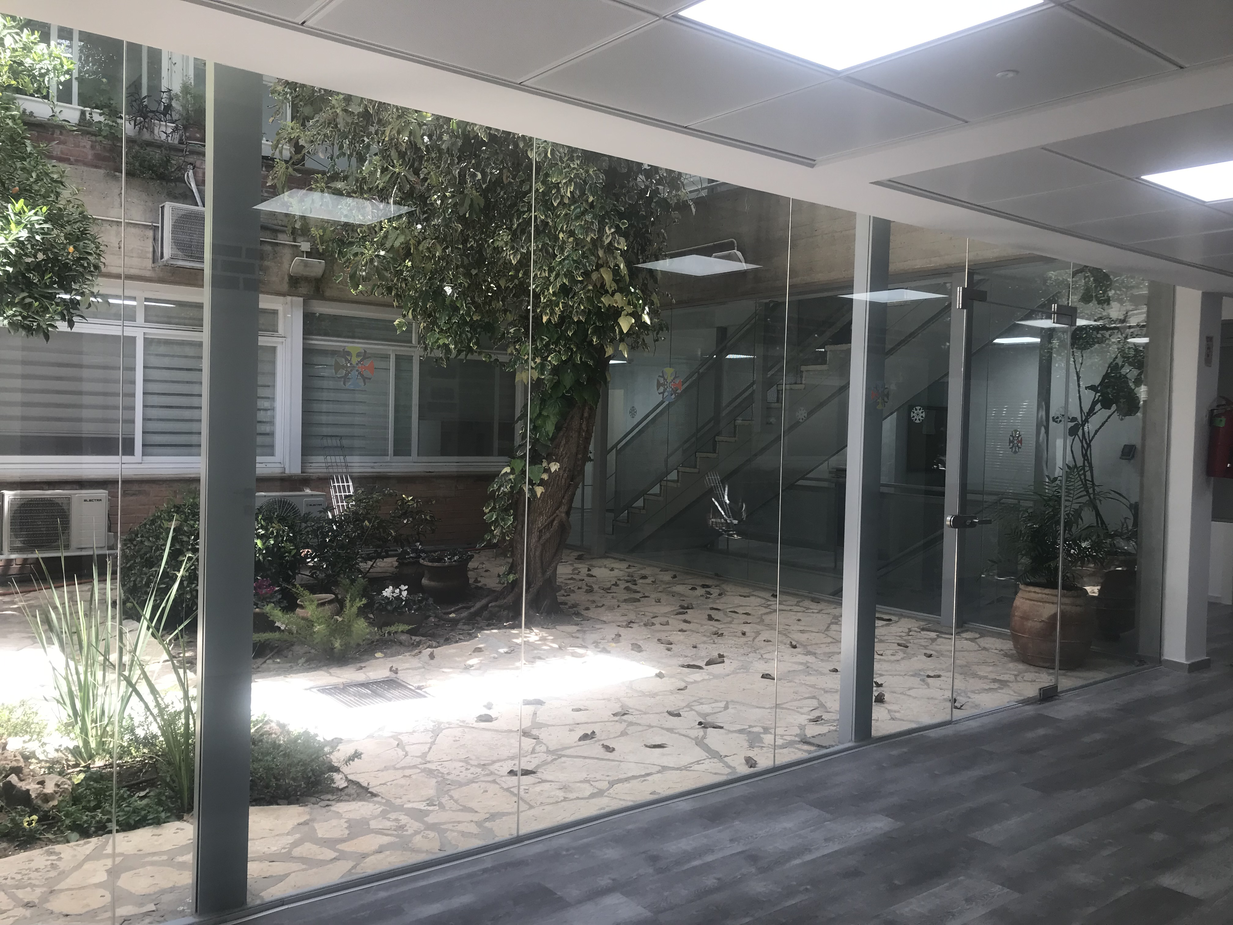 מכון הנרייטה סאלד (ע"ר) הוא מכון ציבורי ששם לו למטרה לקדם את החינוך והחברה בישראל.